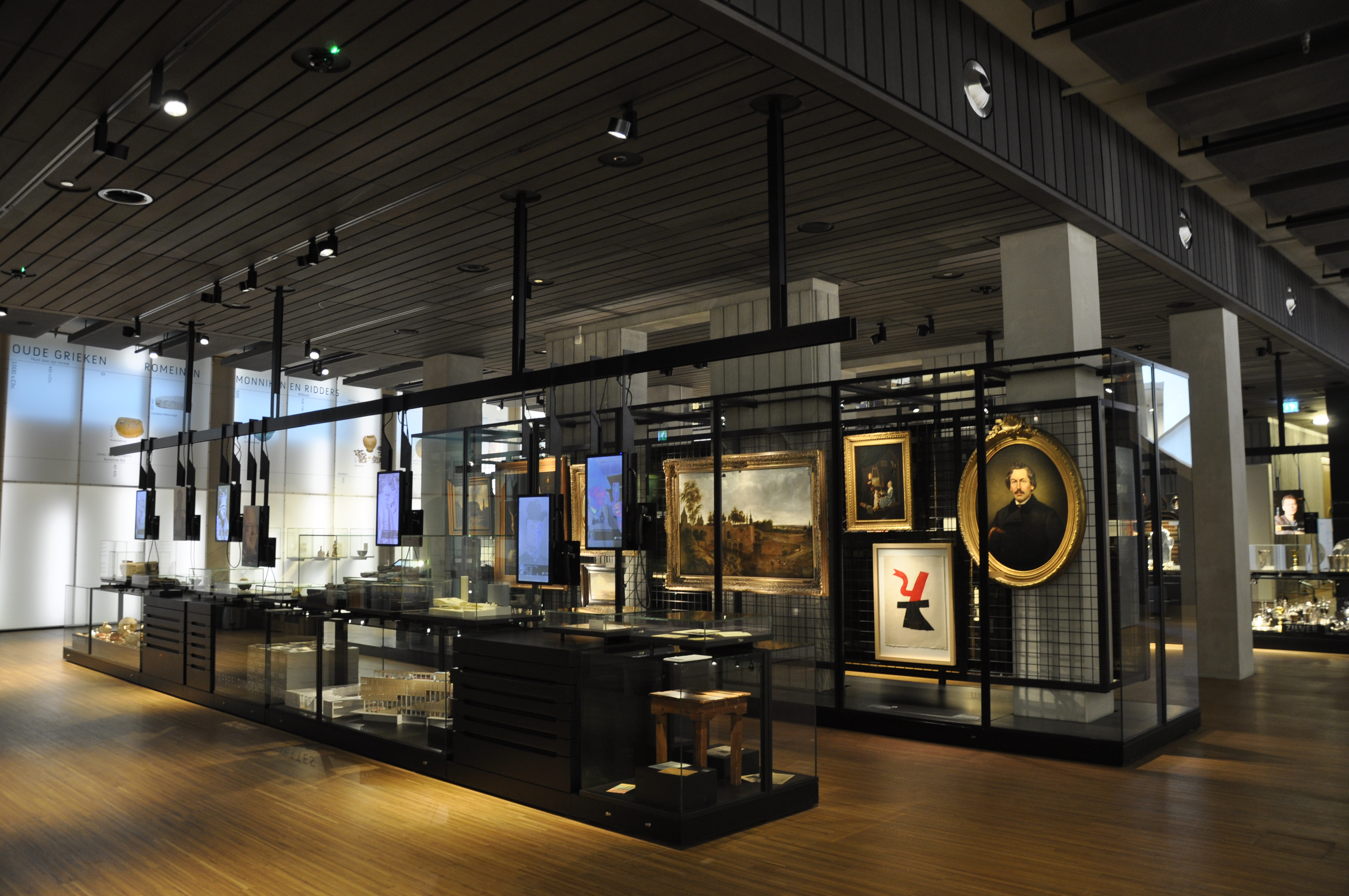 Rozet Arnhem